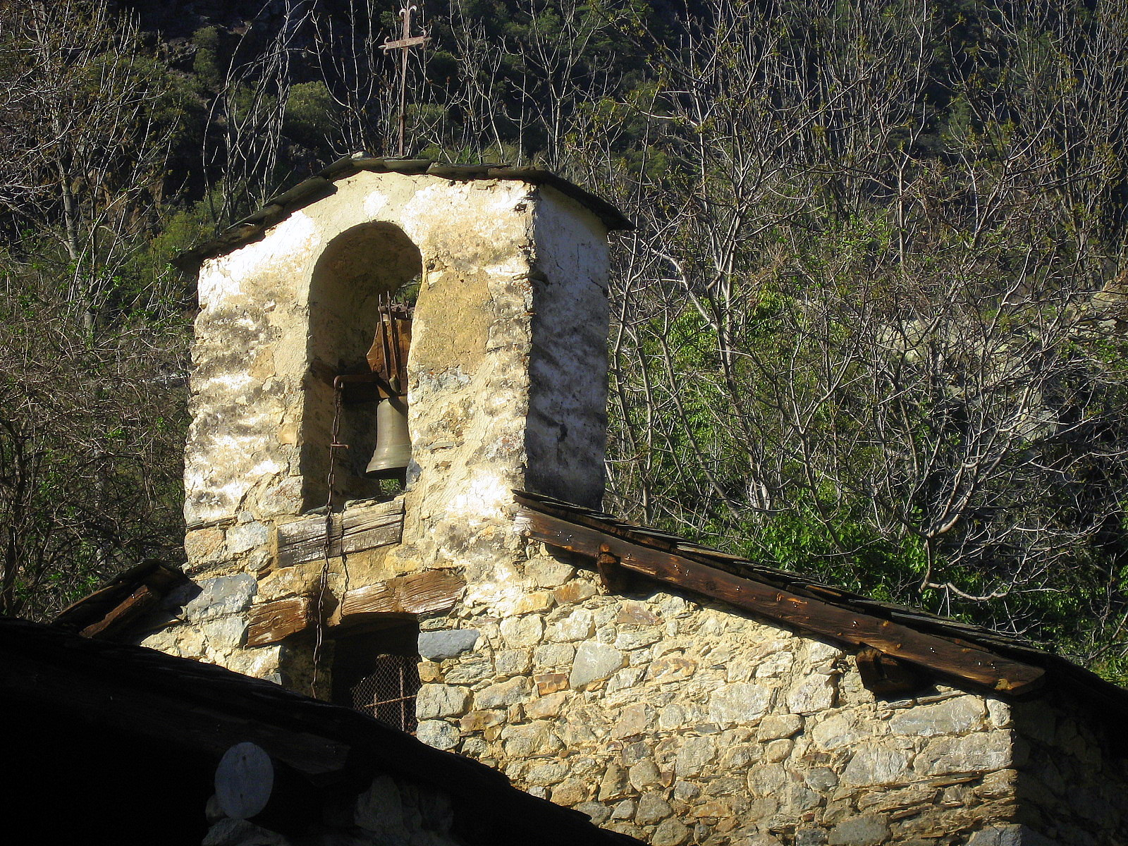 Church: Sant Esteve de Bixessarri